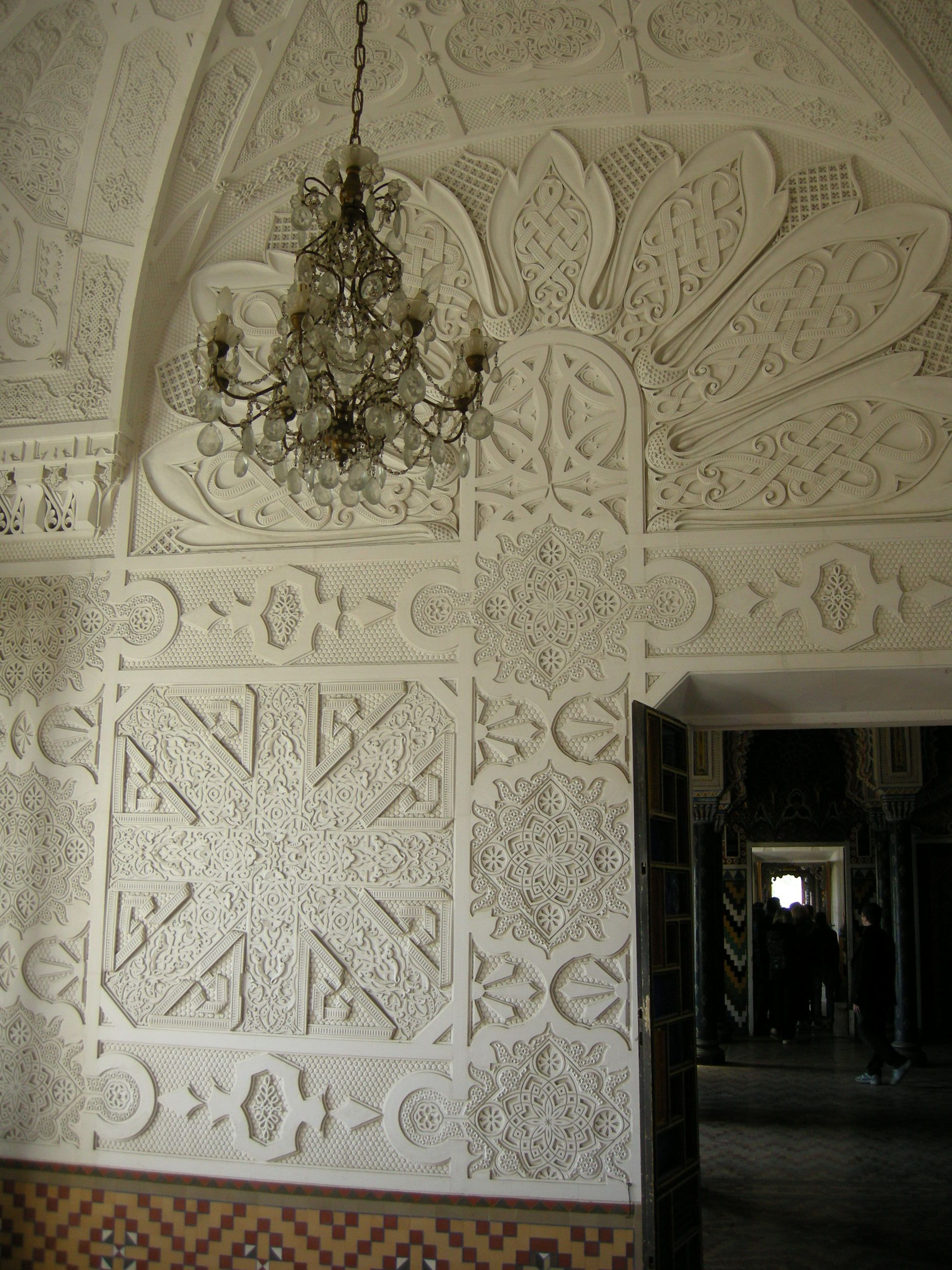 Sammezzano, sala 14 (stucchi bianchi)